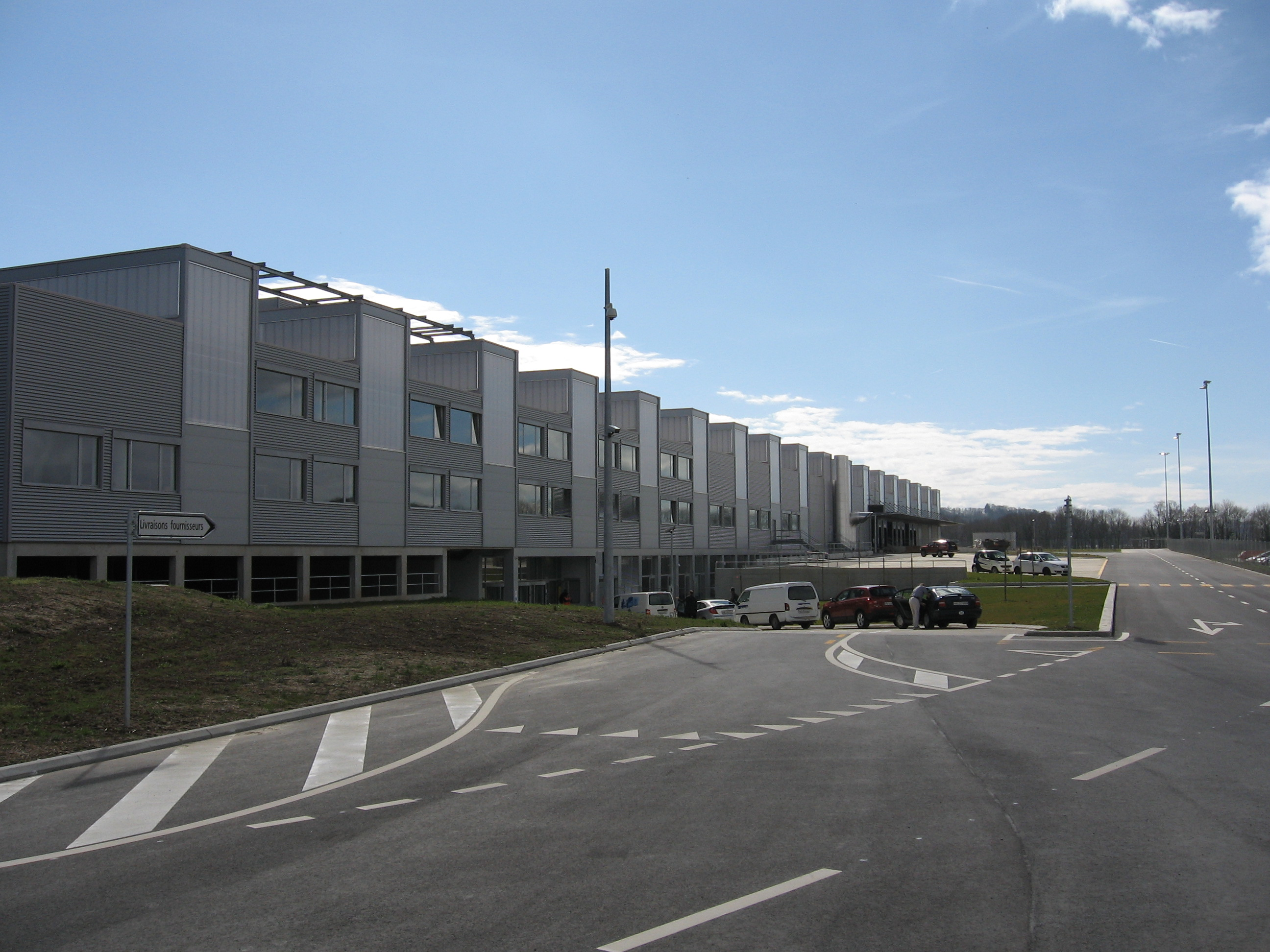 Briefzentrum_Eclépens, Centres courrier d’Eclépens